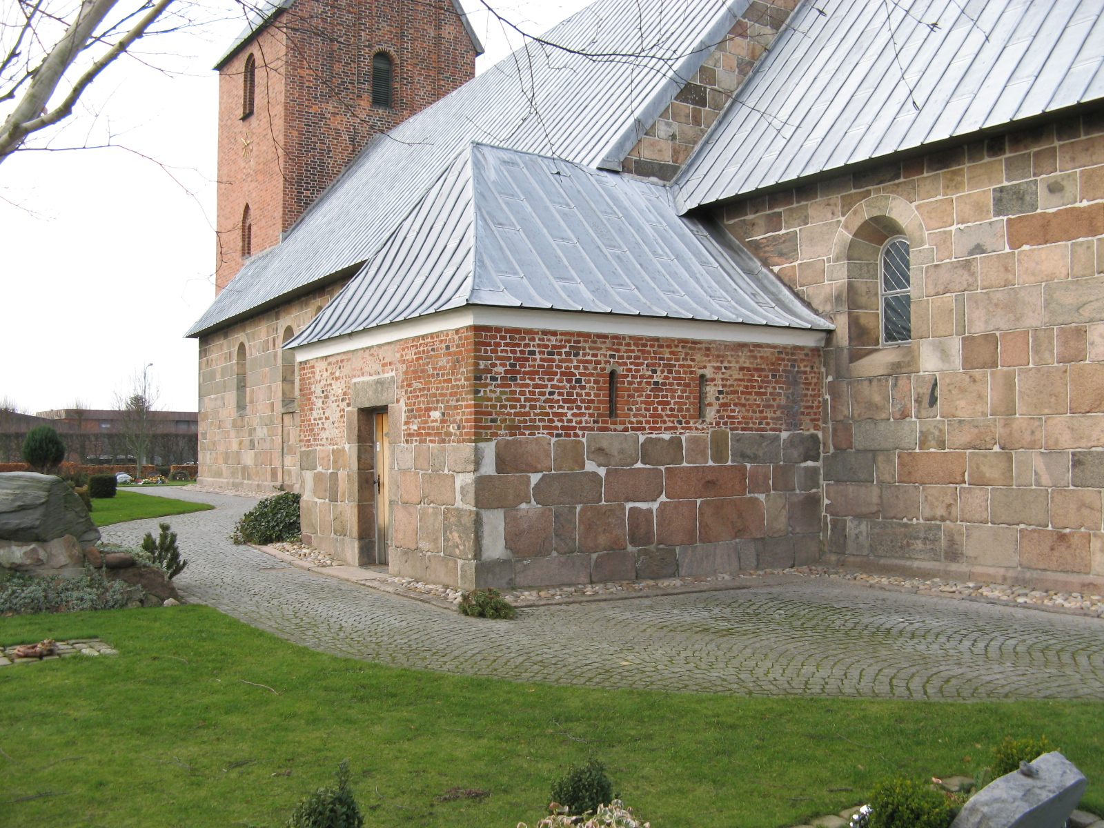 Jerne Kirke, Jerne sogn, Esbjerg kommune (former: Skads Herred, Ribe Amt). Forhenværende sakristi på kirkens sydside.